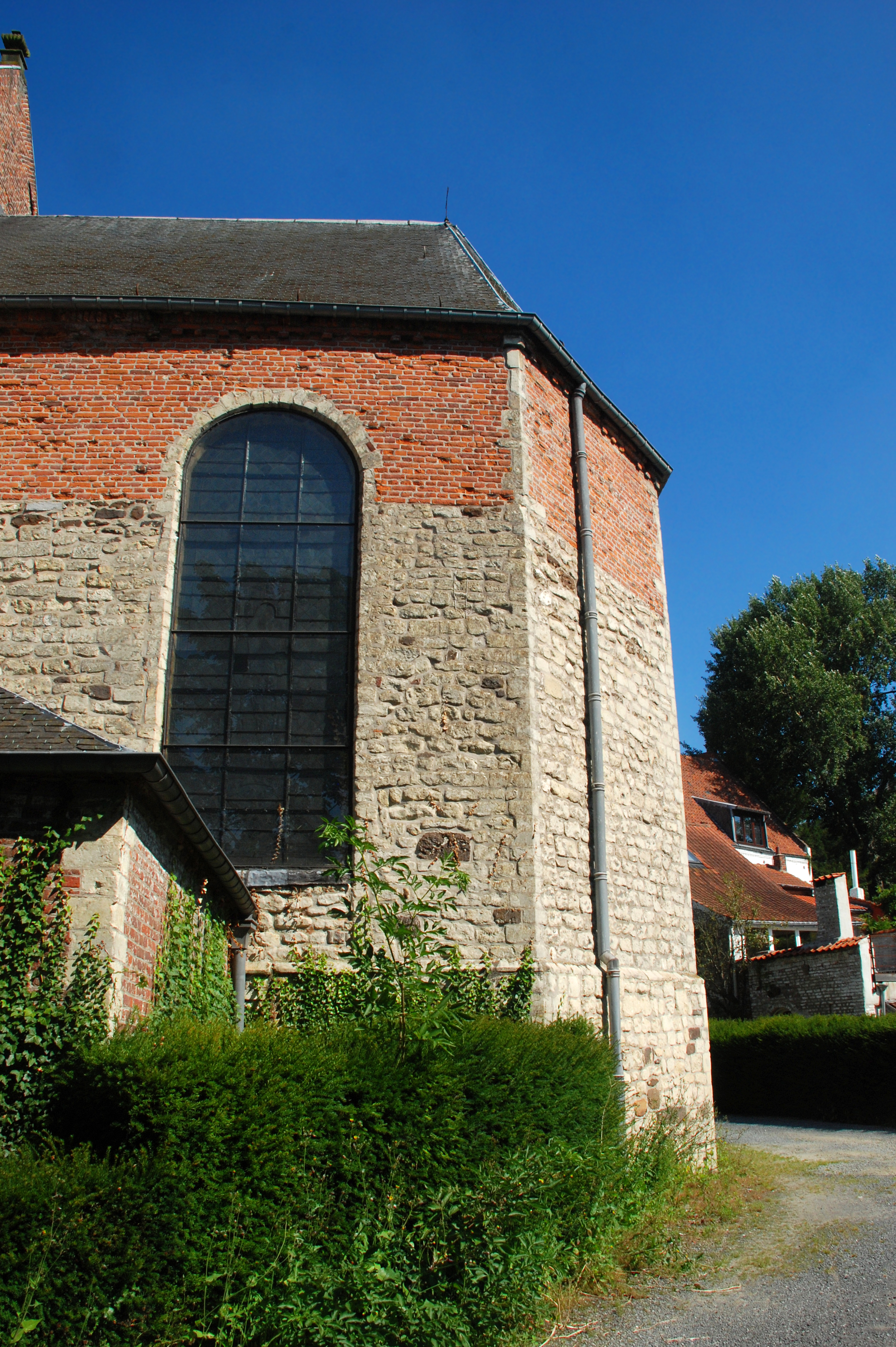 Belgique - Brabant Wallon - Lasne - Église Saint-Étienne d'Ohain